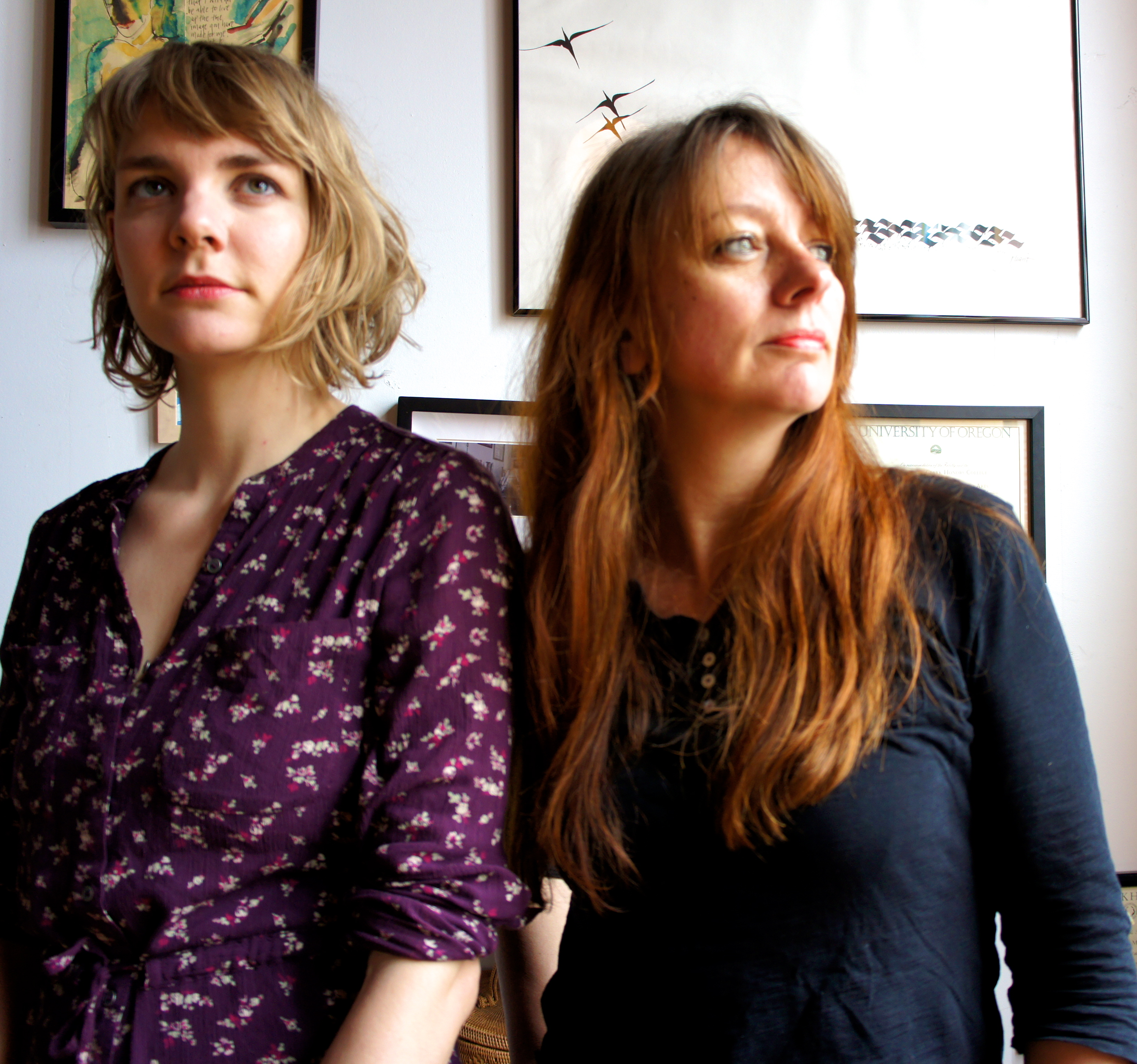 The Lasses, links Sophie, rechts Margot. Foto gemaakt in Portland, Oregon.